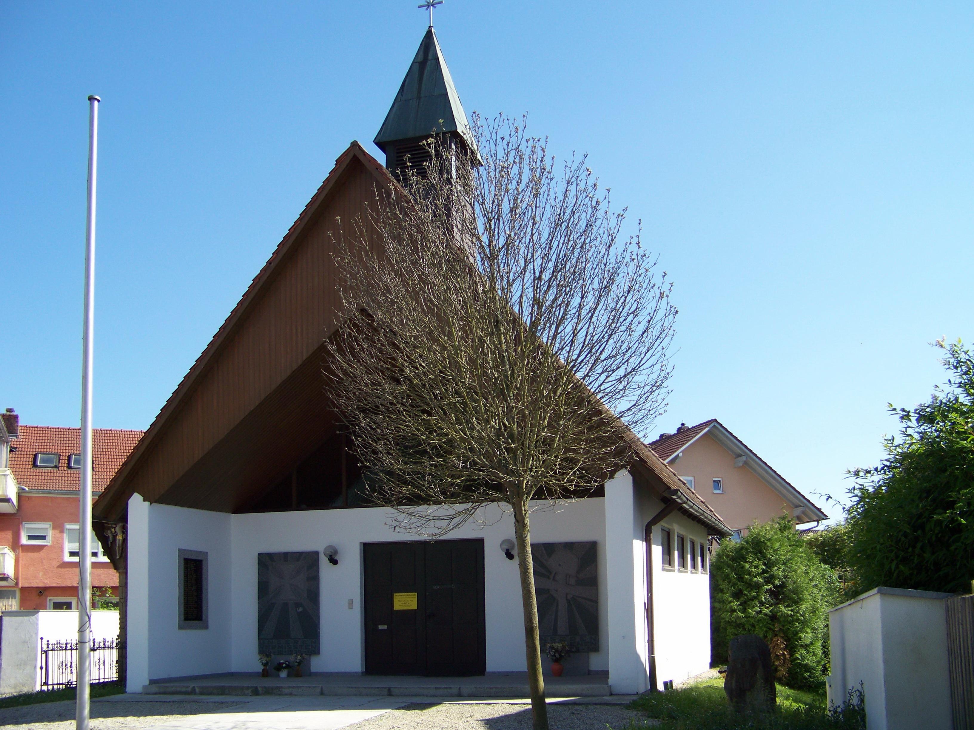 Deggendorf, Ortszteil Fischerdorf. Bruder Konrad Kapelle. Sie wurde zu Beginn der 1970er Jahre durch einen Kapellenbauverein errichtet. Von der Hochwasserkatastrophe im Juni 2013 schwer heimgesucht, wurde sie noch im gleichen Jahr saniert und teilweise neu ausgestattet.